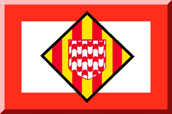 Bandera de ficcion Girona FC Flagh fiction Girona FC